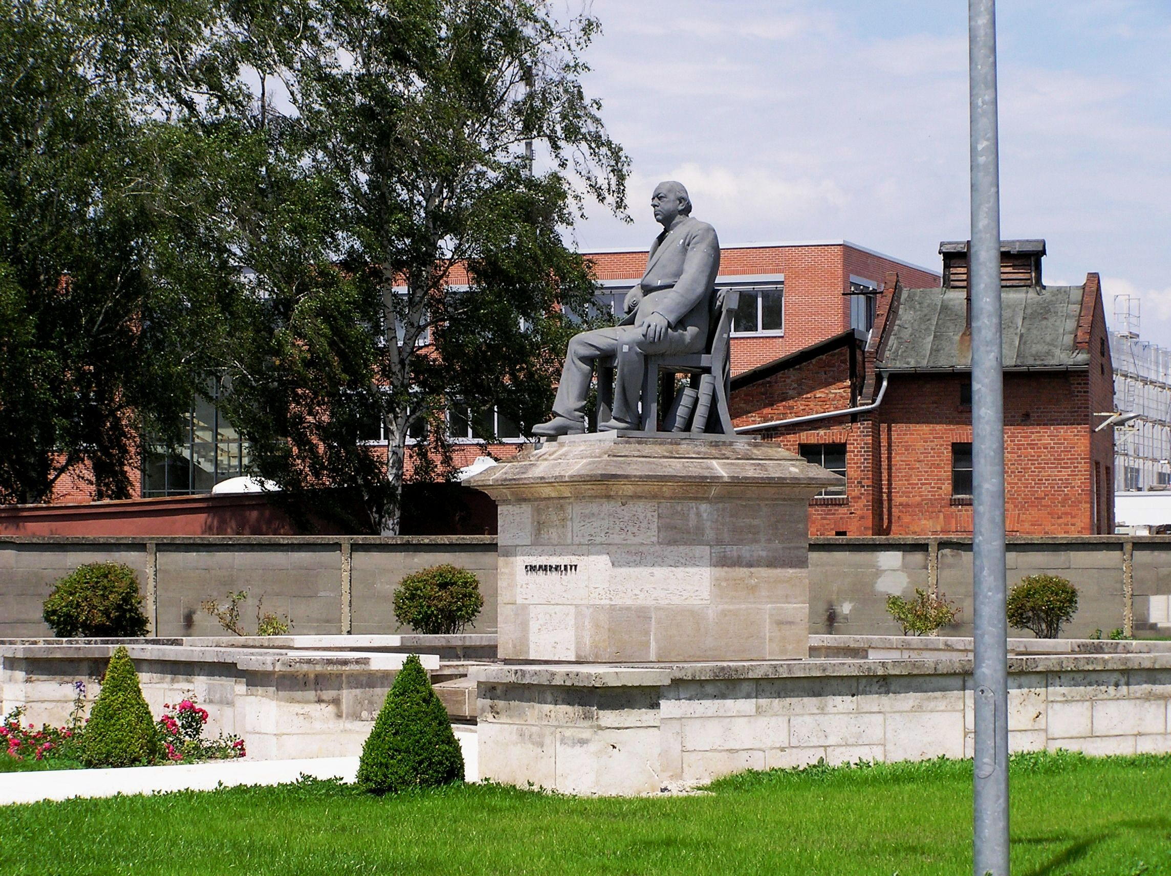 Das Theodor von Cramer-Klett-Denkmal, auf dem Werksgelände des MAN-Motorenwerks in Nürnberg.